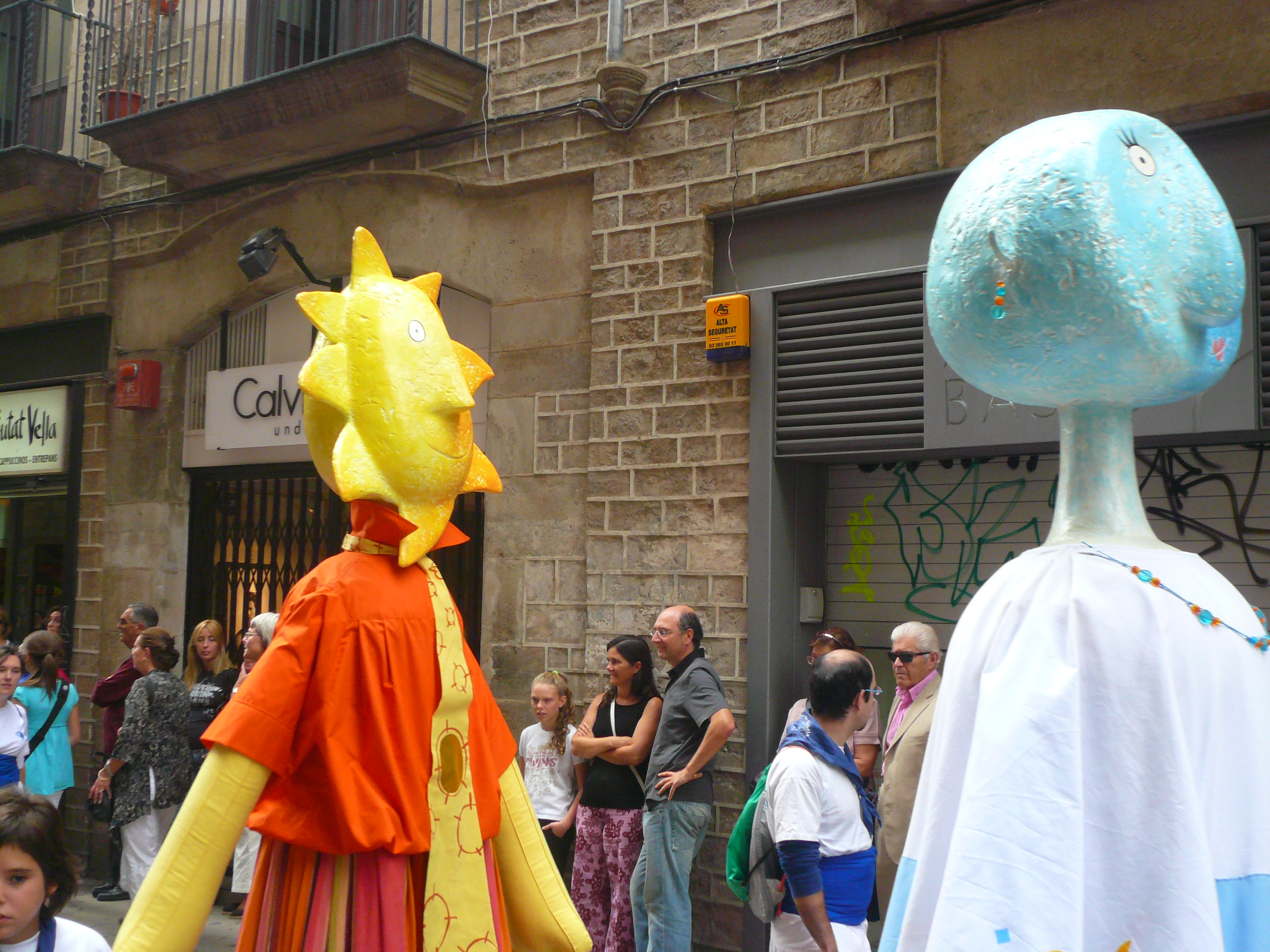 Cavalcada de gegants de les festes de la Mercè del 2008, al tram del carrer Cardenal Casañas, carrer del Pi, carrer Canuda i la Rambla